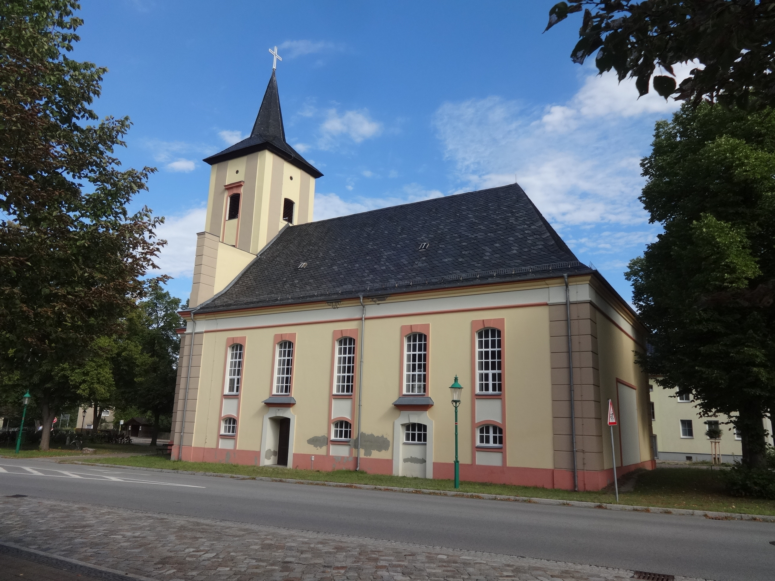 Die Dorfkirche in Märkisch Buchholz ist ein Kirchenbau aus dem Jahr 1753, der auf einen Vorgängerbau aus dem 14. Jahrhundert zurückgeht. Er wurde von August Wilhelm von Preußen, dem jüngeren Bruder von Friedrich II. finanziert. Das Bauwerk konnte in den 2000er Jahren sukzessive saniert werden.